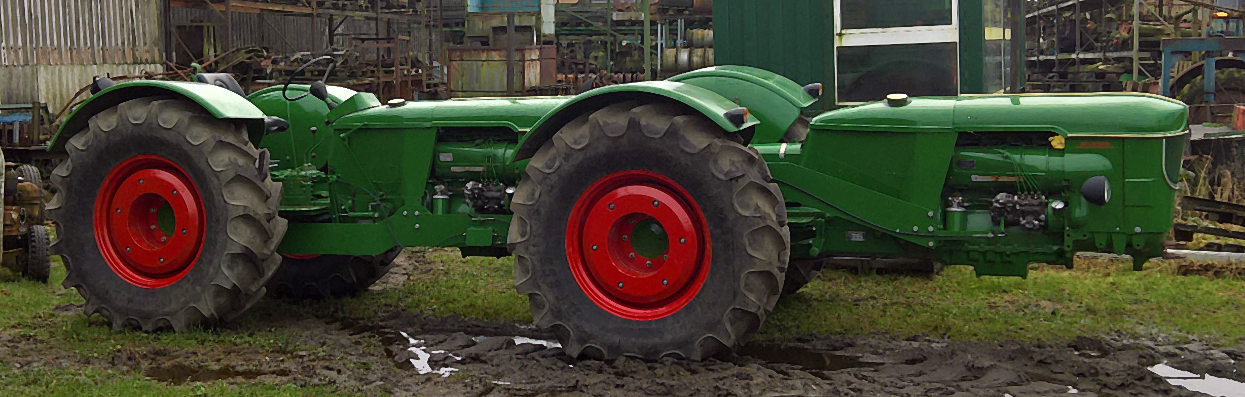 Deutz D 5505 Tandem Nachbau bei